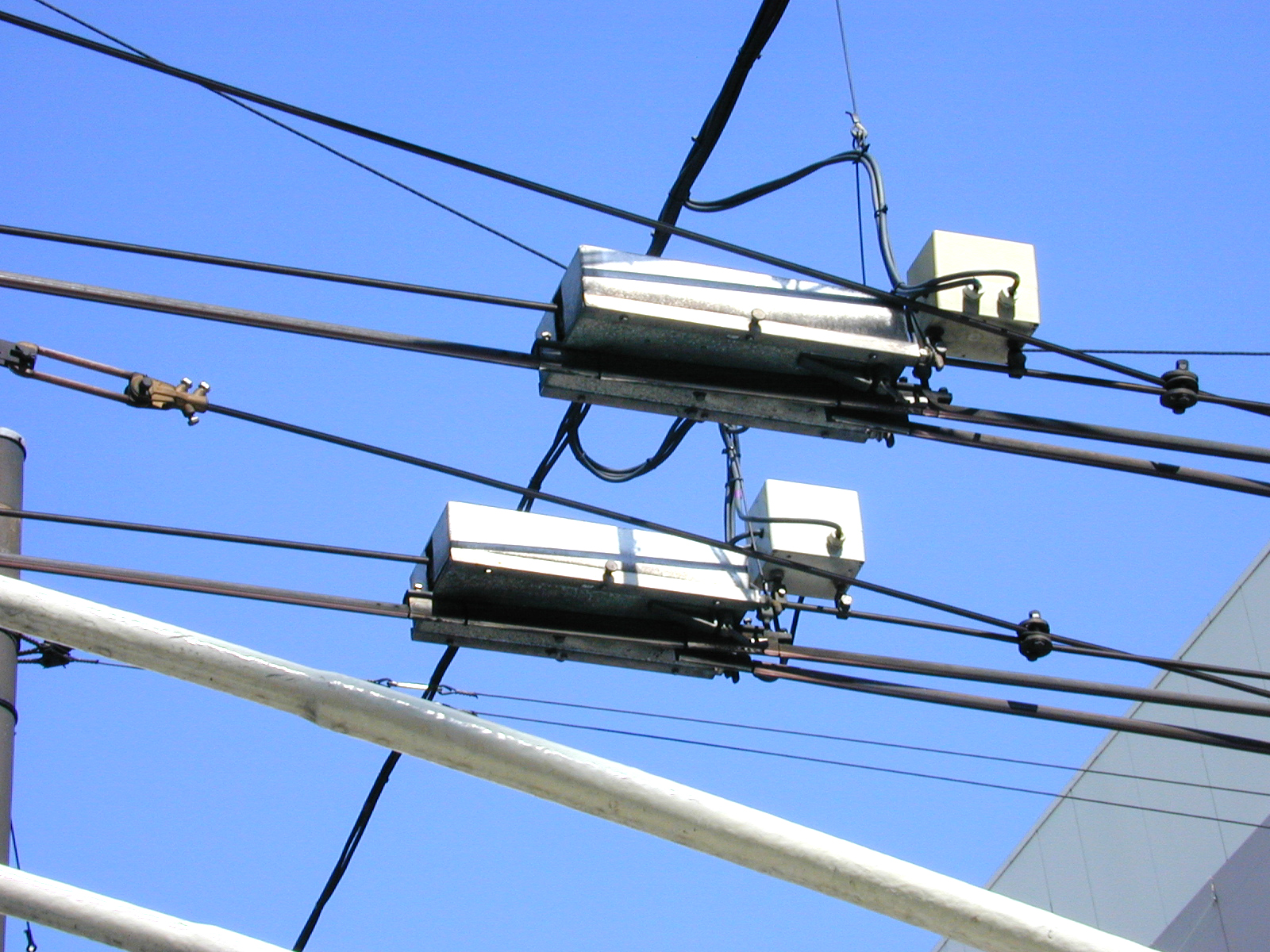 Bovenleiding bediende wissel van het Arnhems trolleybusnet.